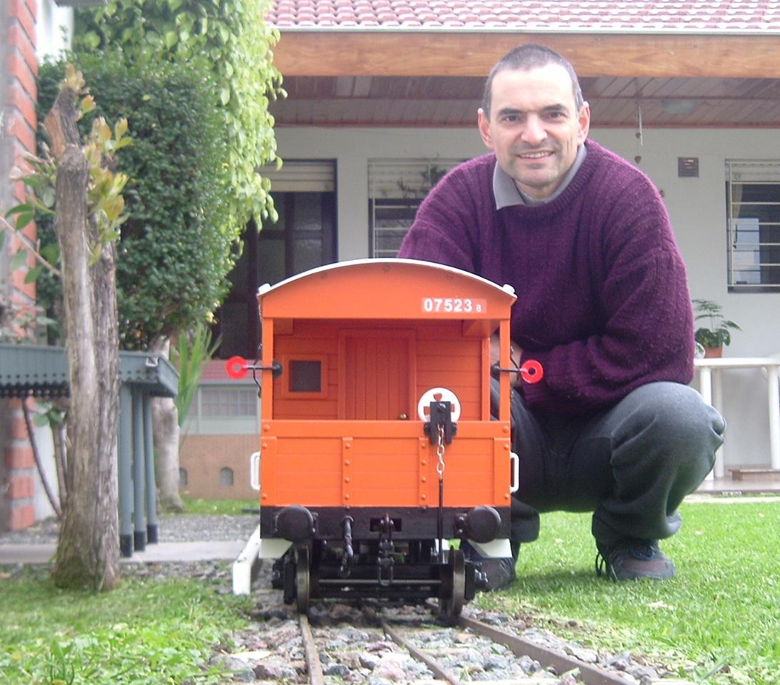 Furgón de cola del Tren de las Rosas y su creador